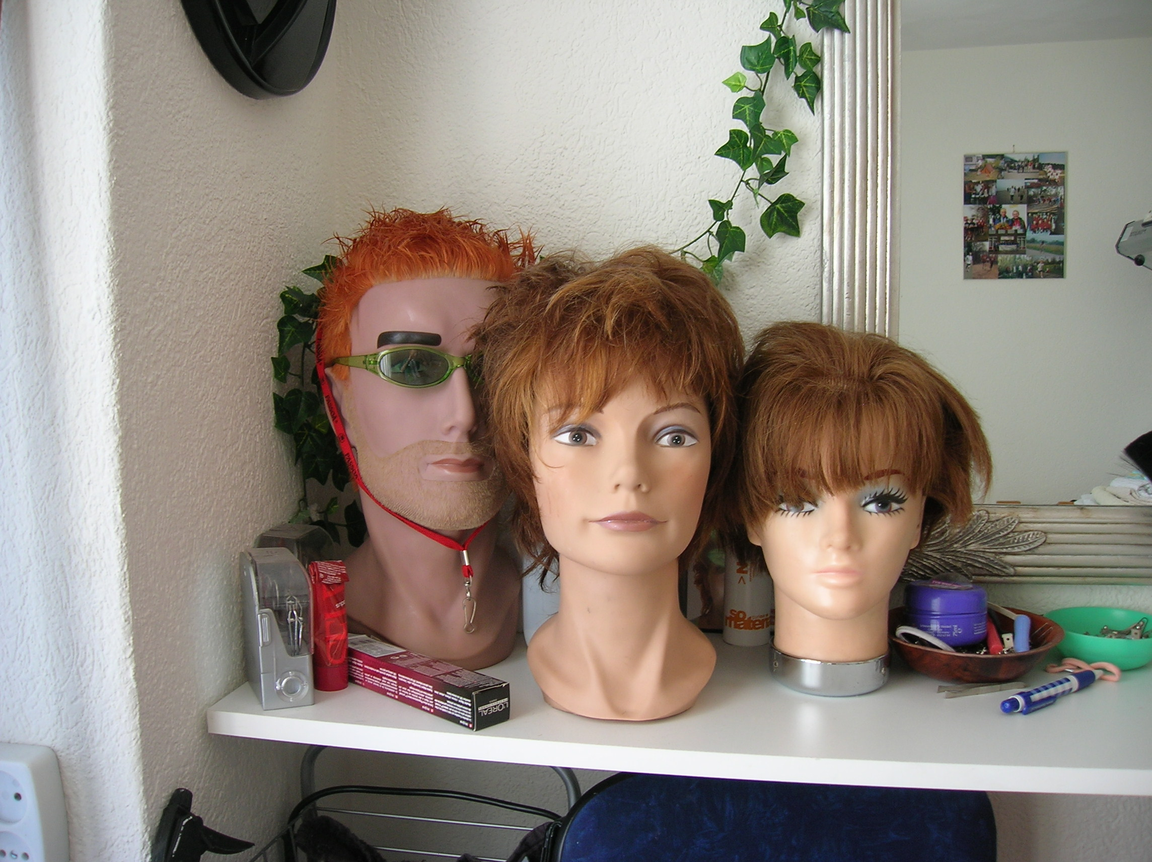 Zelfgemaakte foto, 11 juli 2006: zogenaamde kap-poppen voor het oefenen van het kappersvak. Foto thuis genomen (d.w.z. bij thuiskapster).